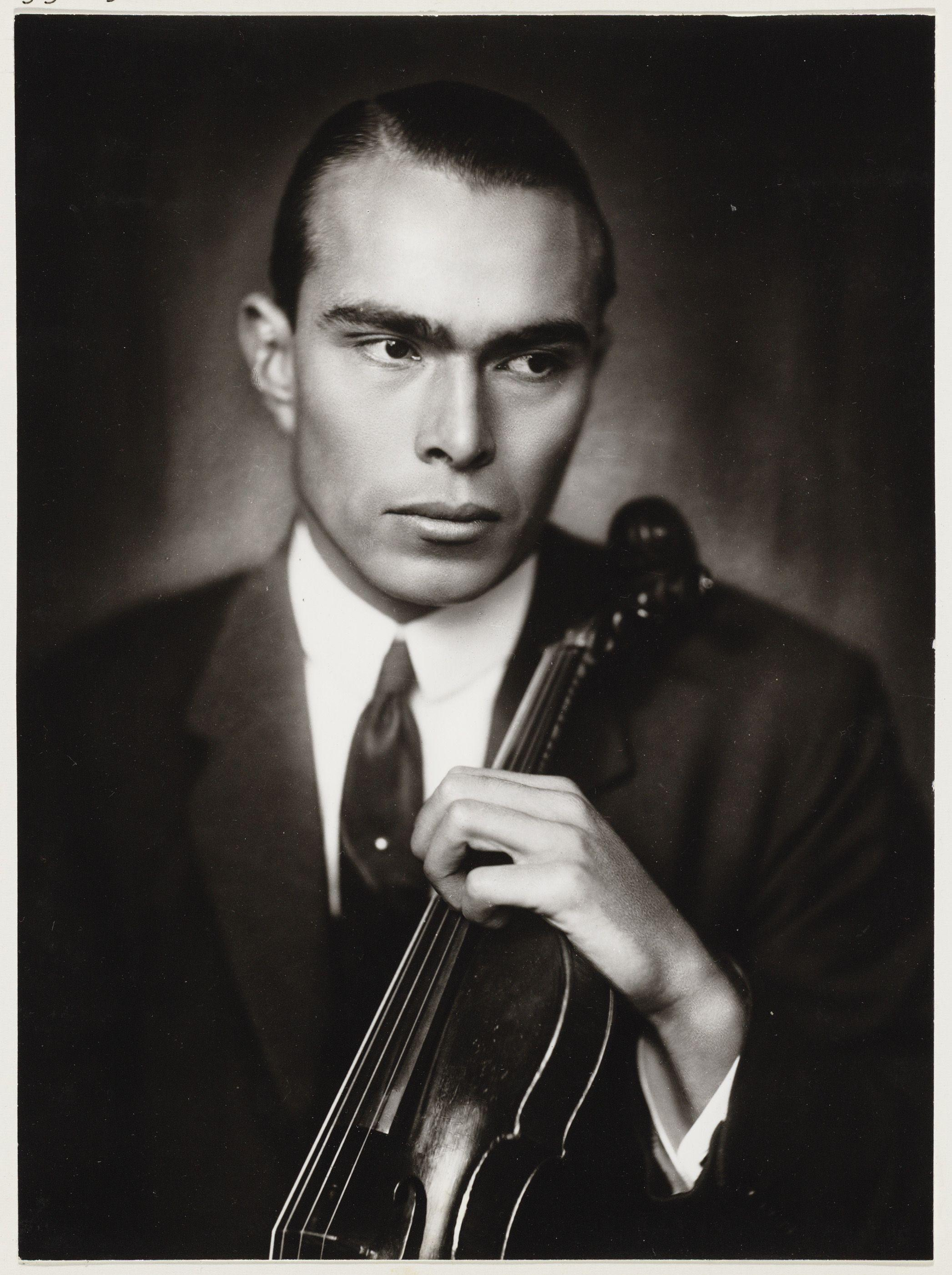 Beschrijving Francis Koene (1899-1935) Violist, concertmeester Utrechts Stedelijk Orkest. Documenttype foto Vervaardiger Merkelbach, Atelier J. Collectie Collectie Atelier J. Merkelbach Datering 1922 Inventarissen Afbeeldingsbestand B00000002216 Generated with Dememorixer